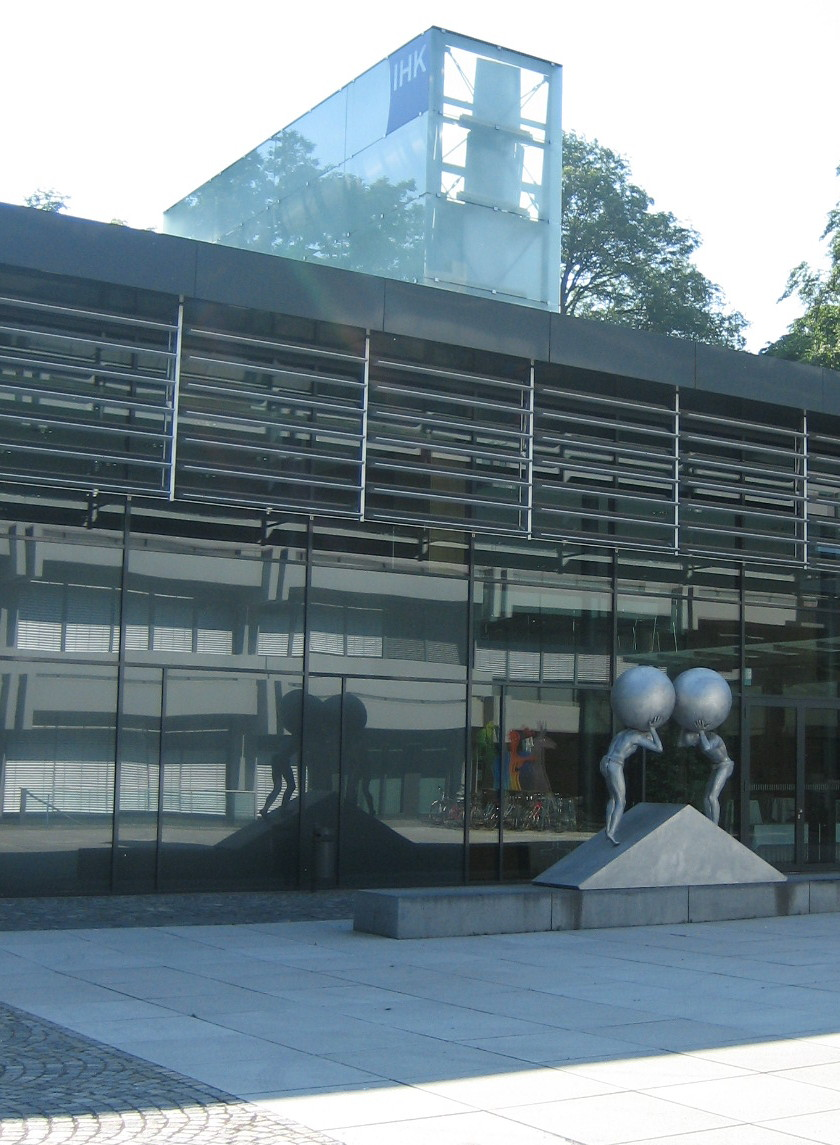 Verwaltungsgebäude (Teilansicht) der IHK in Augsburg, Stettenstraße